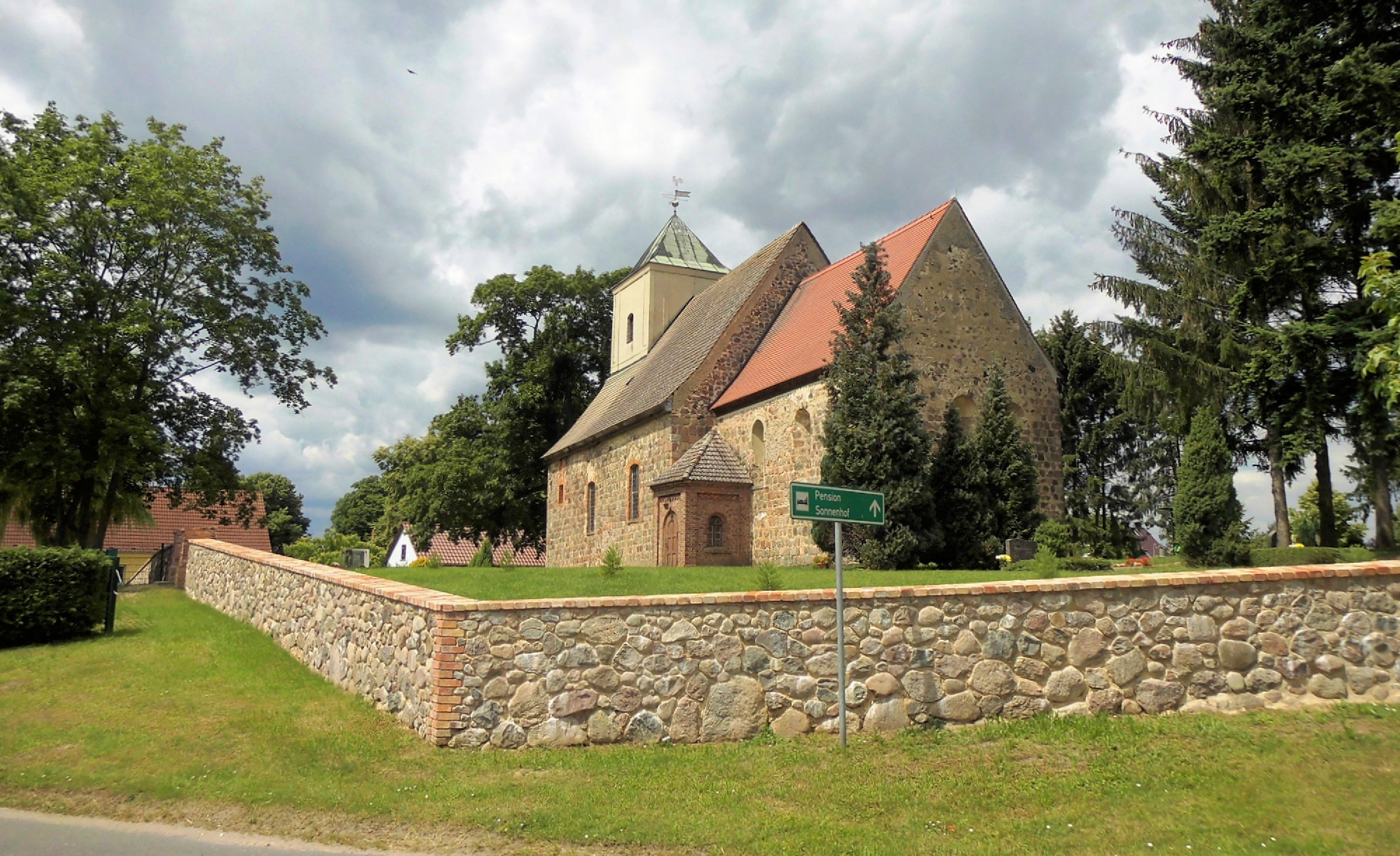 Dorfkirche und Feldsteinmauer des Kirchhofs in Beerfelde, Gemeinde Steinhöfel, Landkreis Oder-Spree, Deutschland